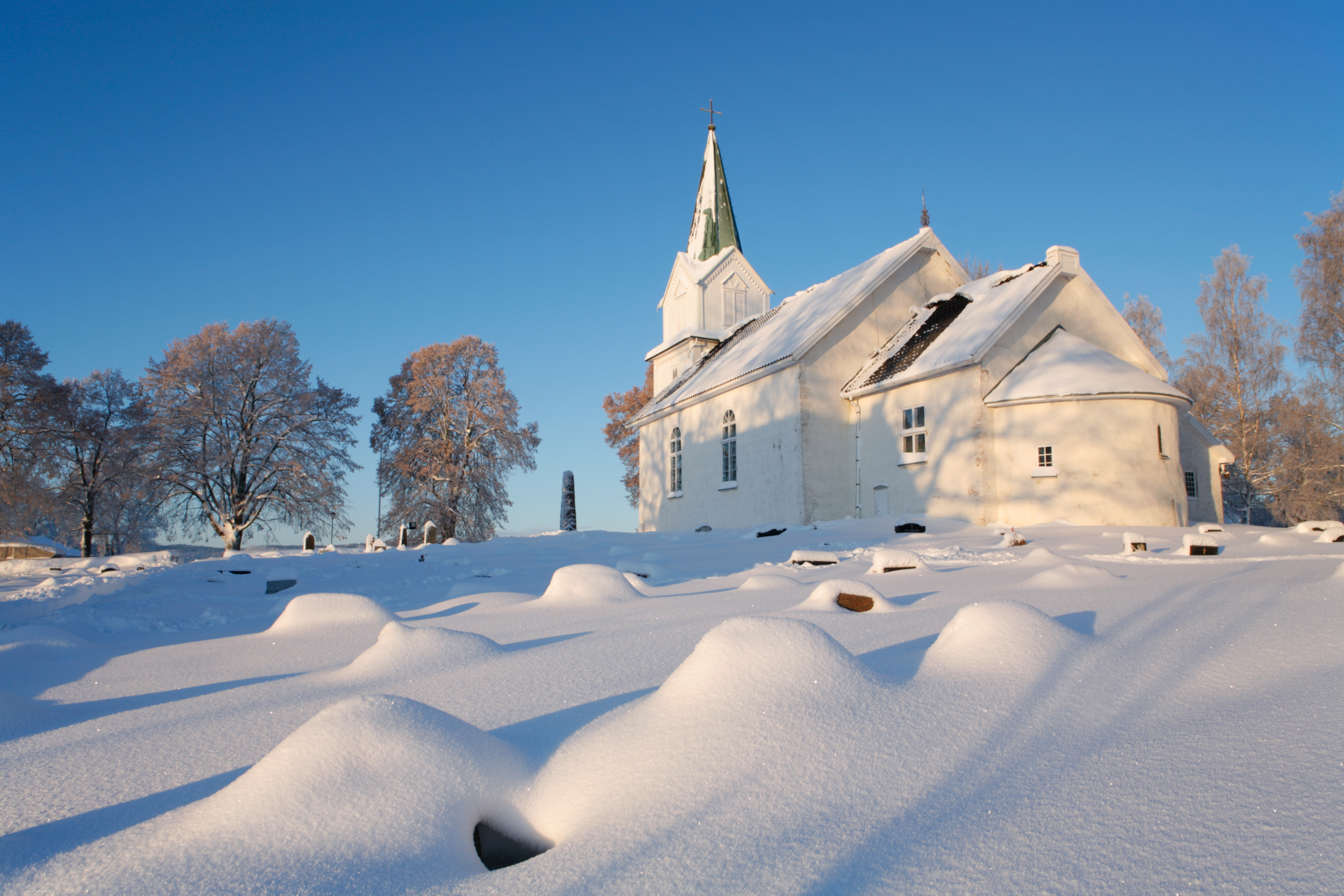 Hurum kirke en tidlig vintermorgen. Den eldste delen av denne steinkirken er fra middelalderen. I førkristen tid var det et hov på omtrent samme sted.